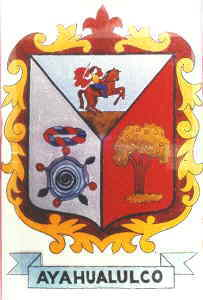 Escudo de Ayahualulco